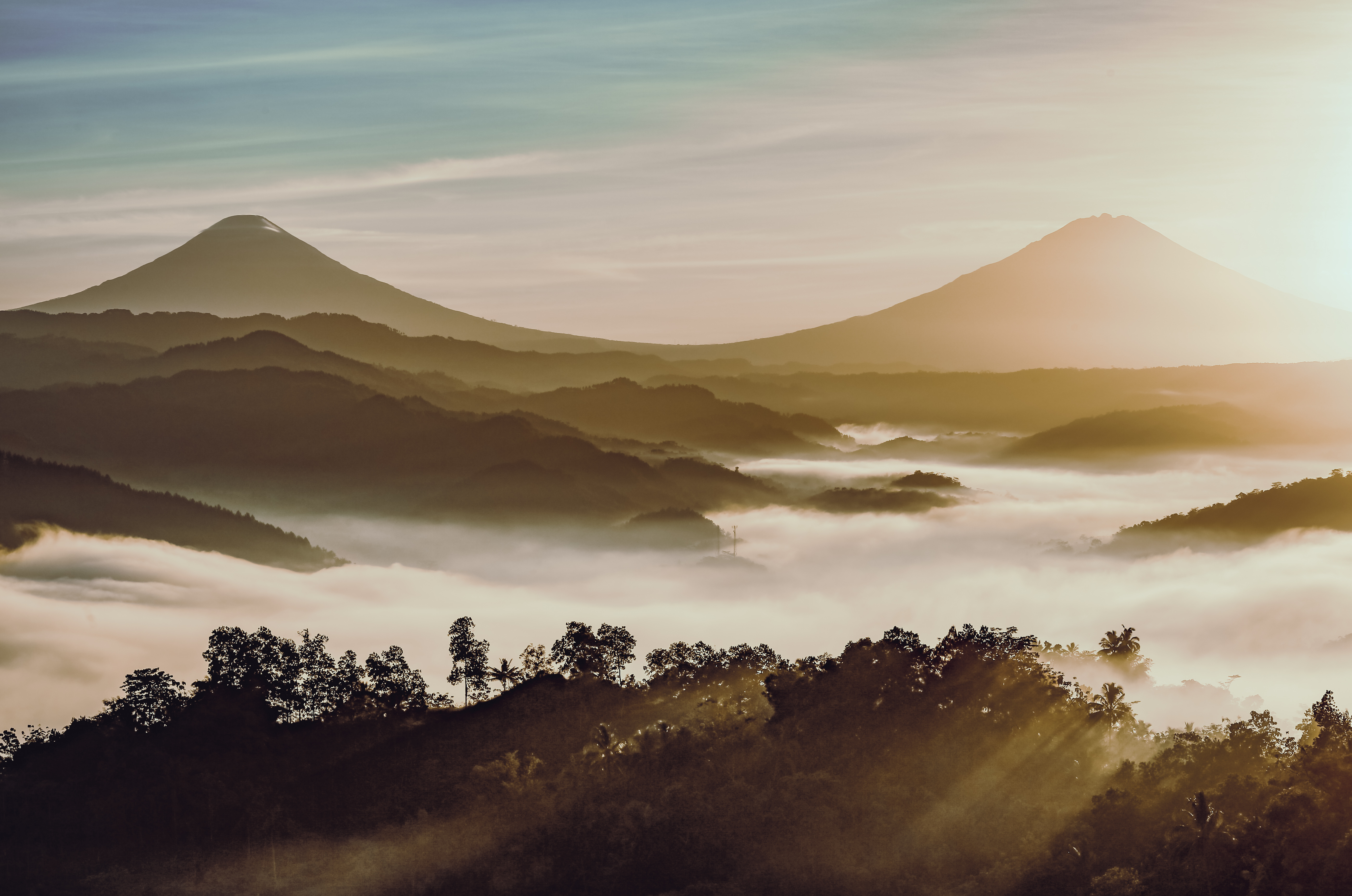 Jika anda mengunjungi Kota Kebumen, banyak wisata yang perlu anda eksplore, salah satunya Bukit Pentulu Indah yang terdapat di Kecamatan Karangsambung, Kebumen. Bukit ini menjadi spot fenomenal, karena bukit ini serupa dengan rumah pohon Kali Biru yang terdapat di Yogyakarta. Di bukit ini, anda juga bisa melihat matahari terbit yang berlatar belakang kabut Gunung Sindoro dan Gunung Sumbing. Untuk sampai di lokasi ini, anda tidak perlu khawatir akan melakukan hiking berat, pasalnya bukit ini hanya memiliki ketinggian 300 meter di atas permukaan laut, sehingga wisata ini sangat recommeded bagi keluarga anda.